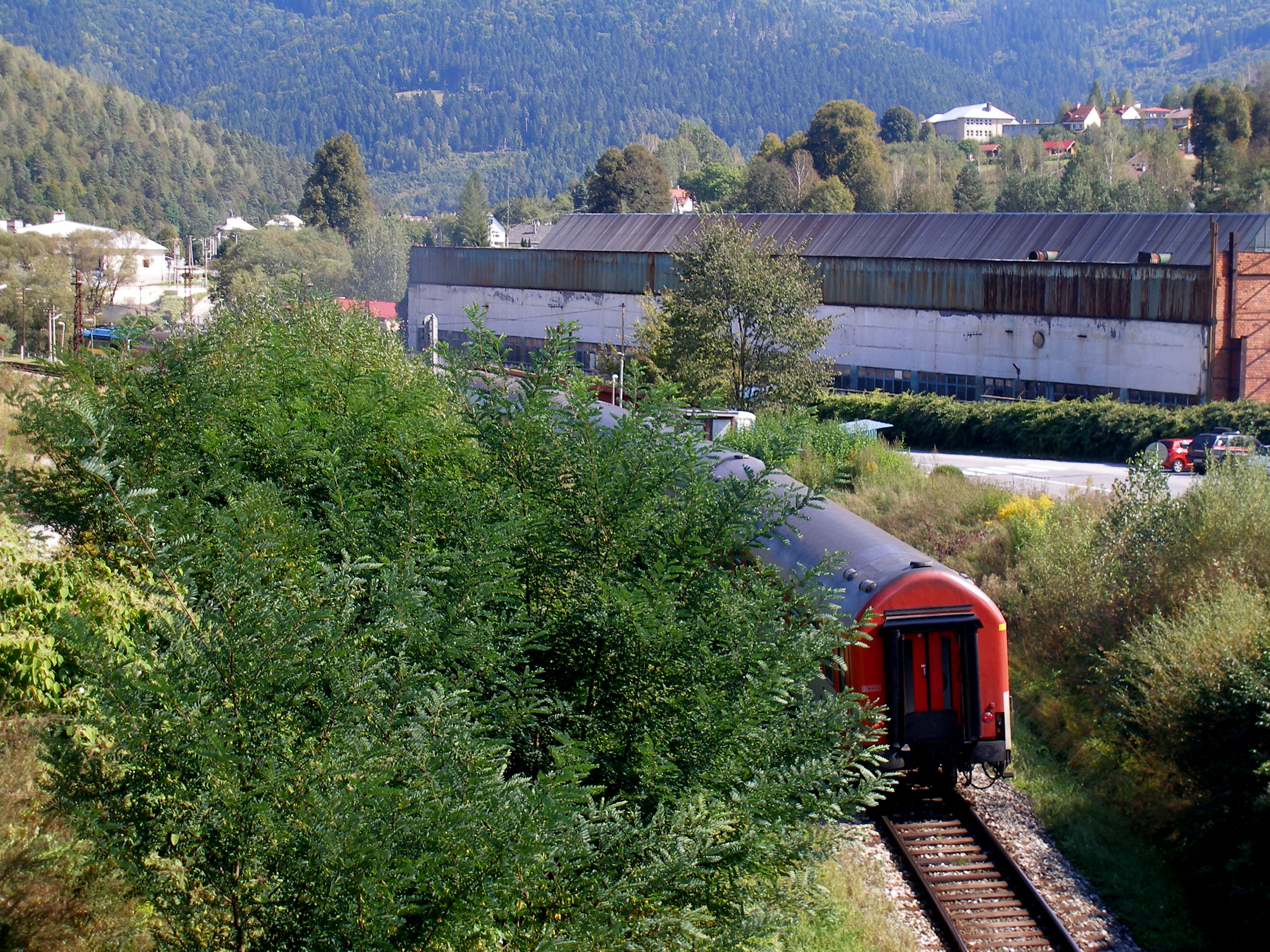 Spišská obec Prakovce. Okres Gelnica.